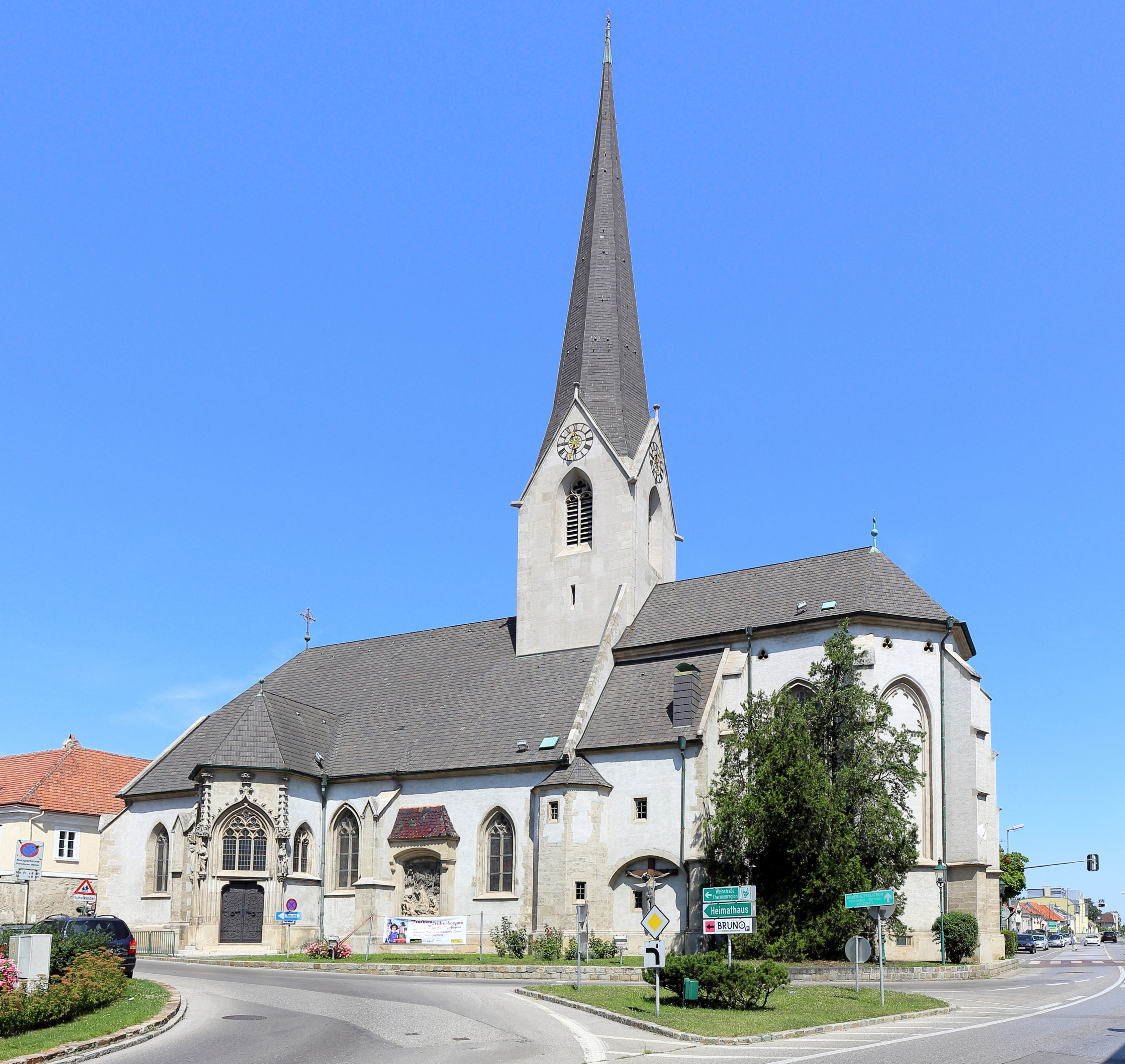 Südostansicht der röm.-kath. Pfarrkirche hl. Kunigunde in der niederösterreichischen Marktgemeinde Brunn am Gebirge.Die gotische Kirche wurde über einer spätromanischen Chorquadratkirche in mehreren Bauphasen ab der ersten Hälfte des 14. Jahrhunderts errichtet. 1855/56 erfolgte eine Renovierung und ein Umbau sowie ein Neubau des Turmes. Eine weitere Renovierung und Umgestaltung führte Gustav von Neumann in den Jahren 1897 bis 1900 durch.